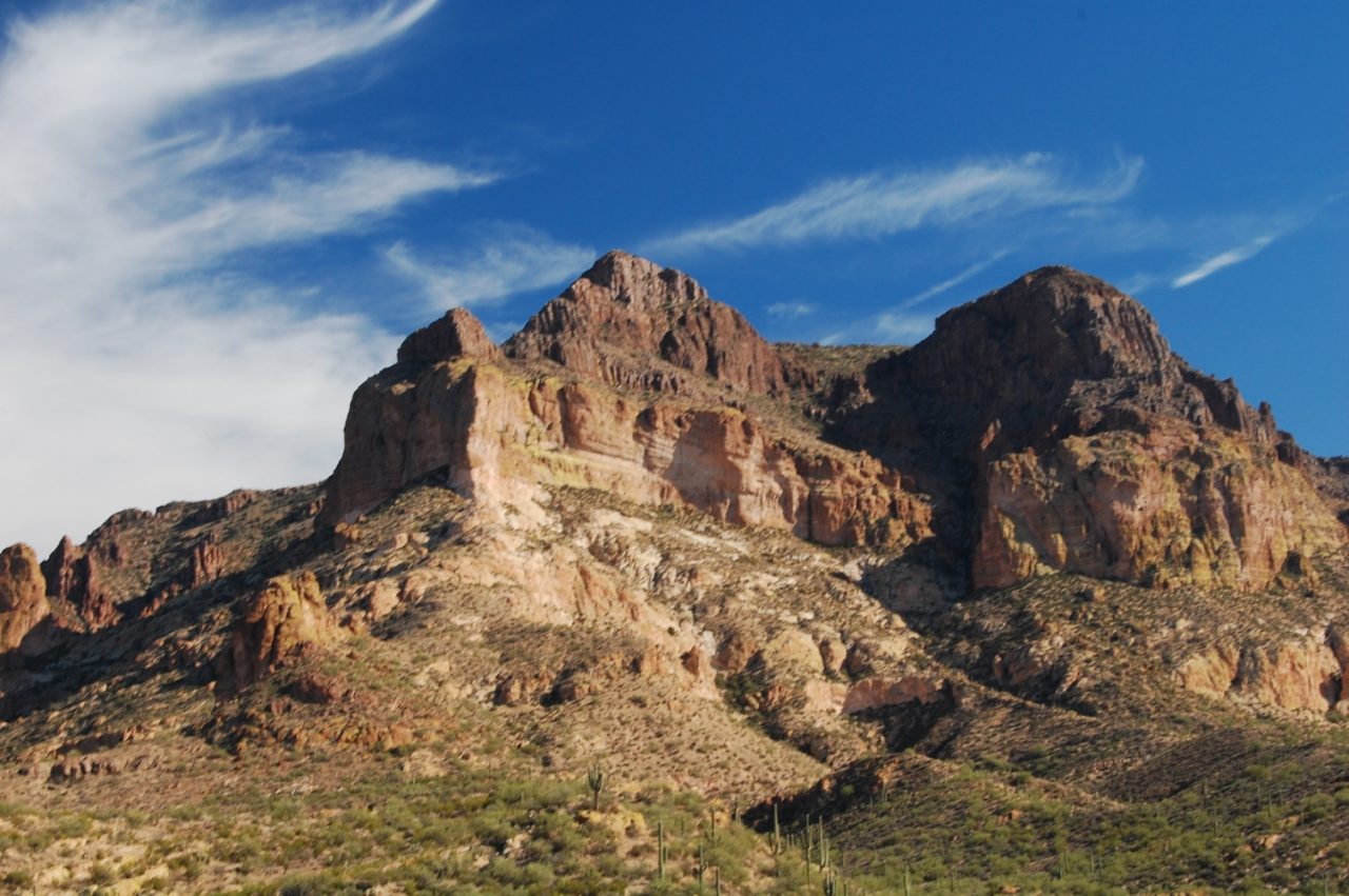 Pickepost Peak